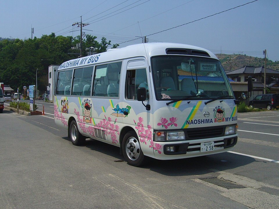 直島町営バス「すなおくん号」 宮ノ浦港にて